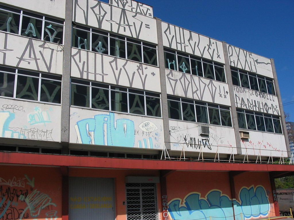 Prédio alvo de pichadores em São Paulo